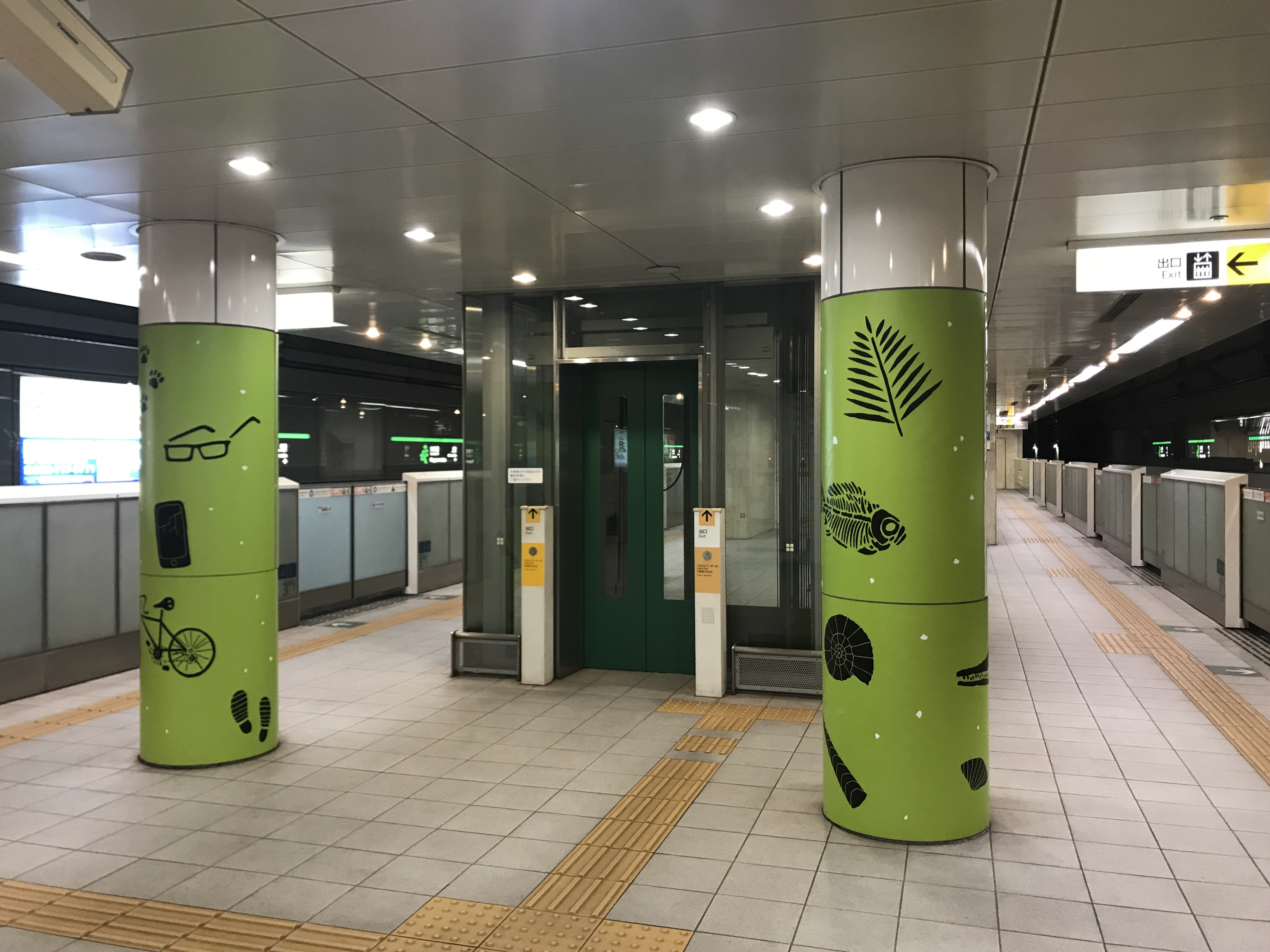 六本松駅のホーム(奥は桜坂方面)